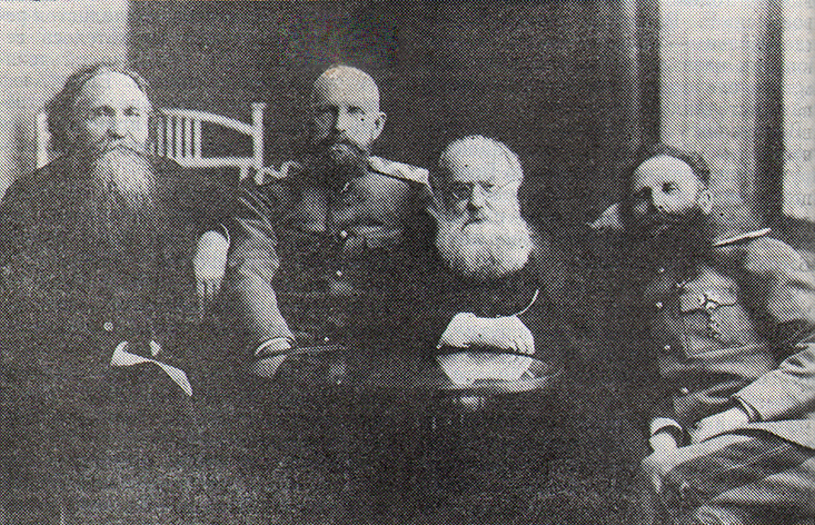 Всеволод, Сергей, Герман и Николай Лопатины